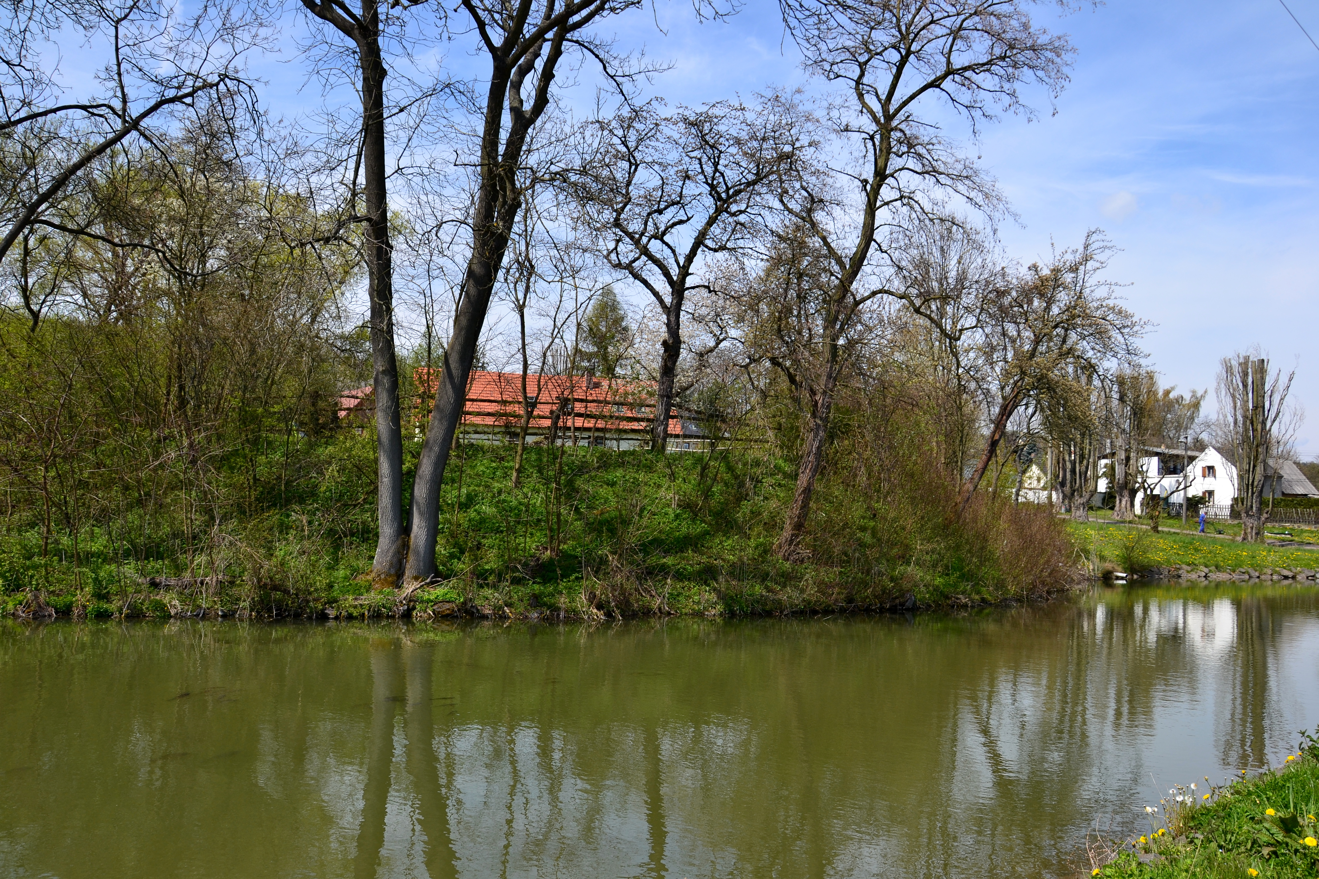 Tvrziště, východně od budovy čp. 23, Jeřeň.